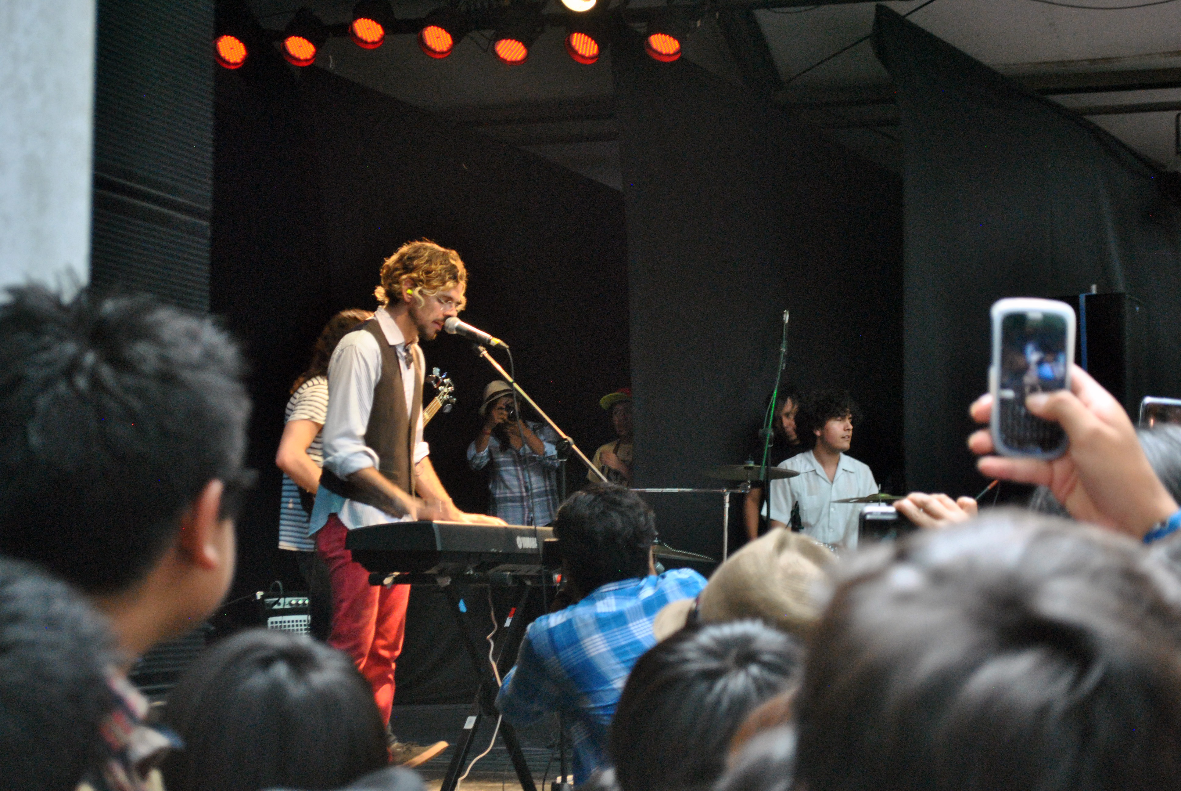 Juan Manuel Torreblanca en concierto en la Casa del Lago de la UNAM.